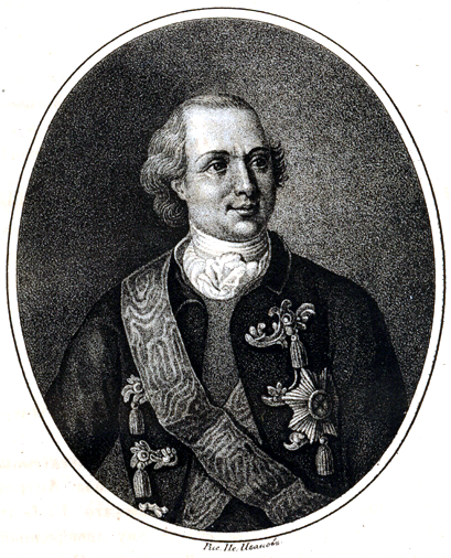 Porträt von Herzog Georg Ludwig von Holstein-Gottorp (1719-1763)